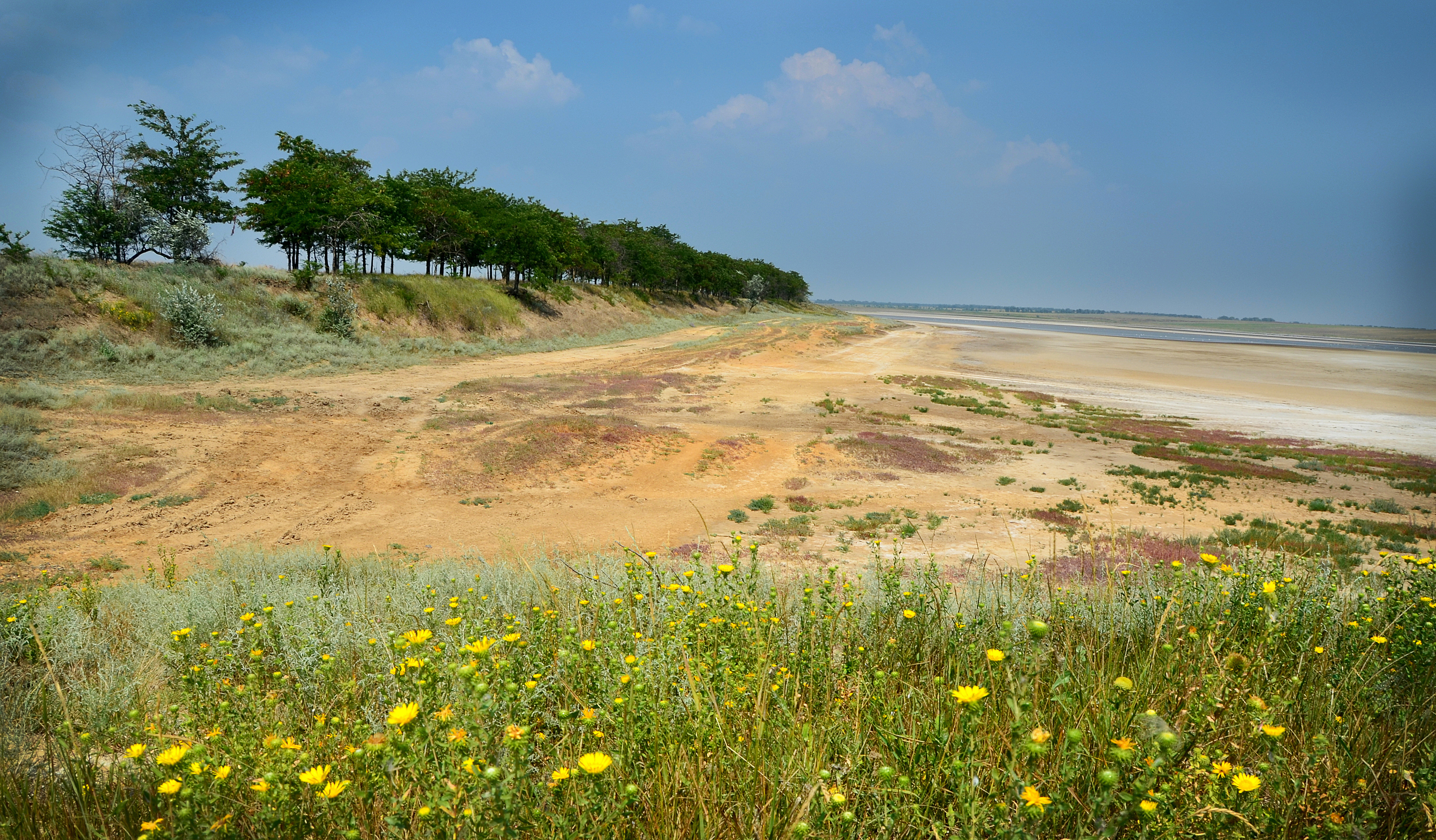 «Тузловські лимани», Татарбунарський район